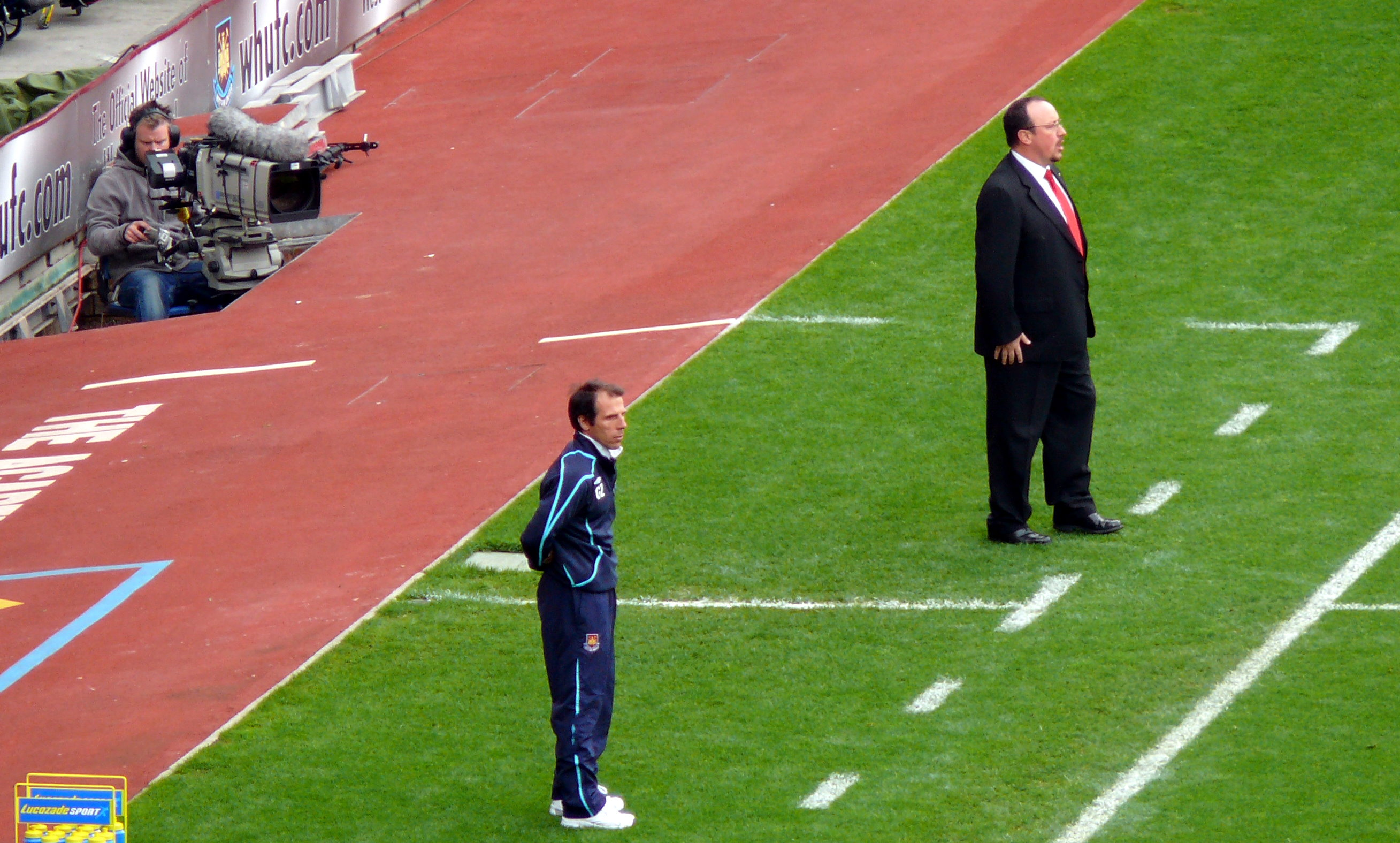 Gianfranco Zola & Liverpool manager Rafael Benítez Upton Park